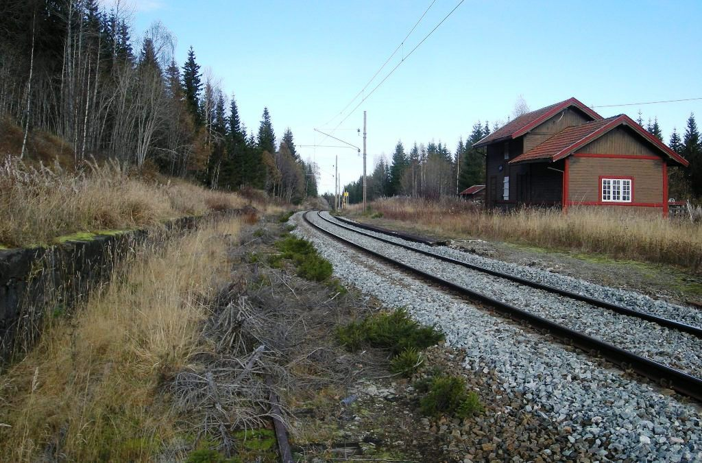 Hågår stasjon på Gjøvikbanen